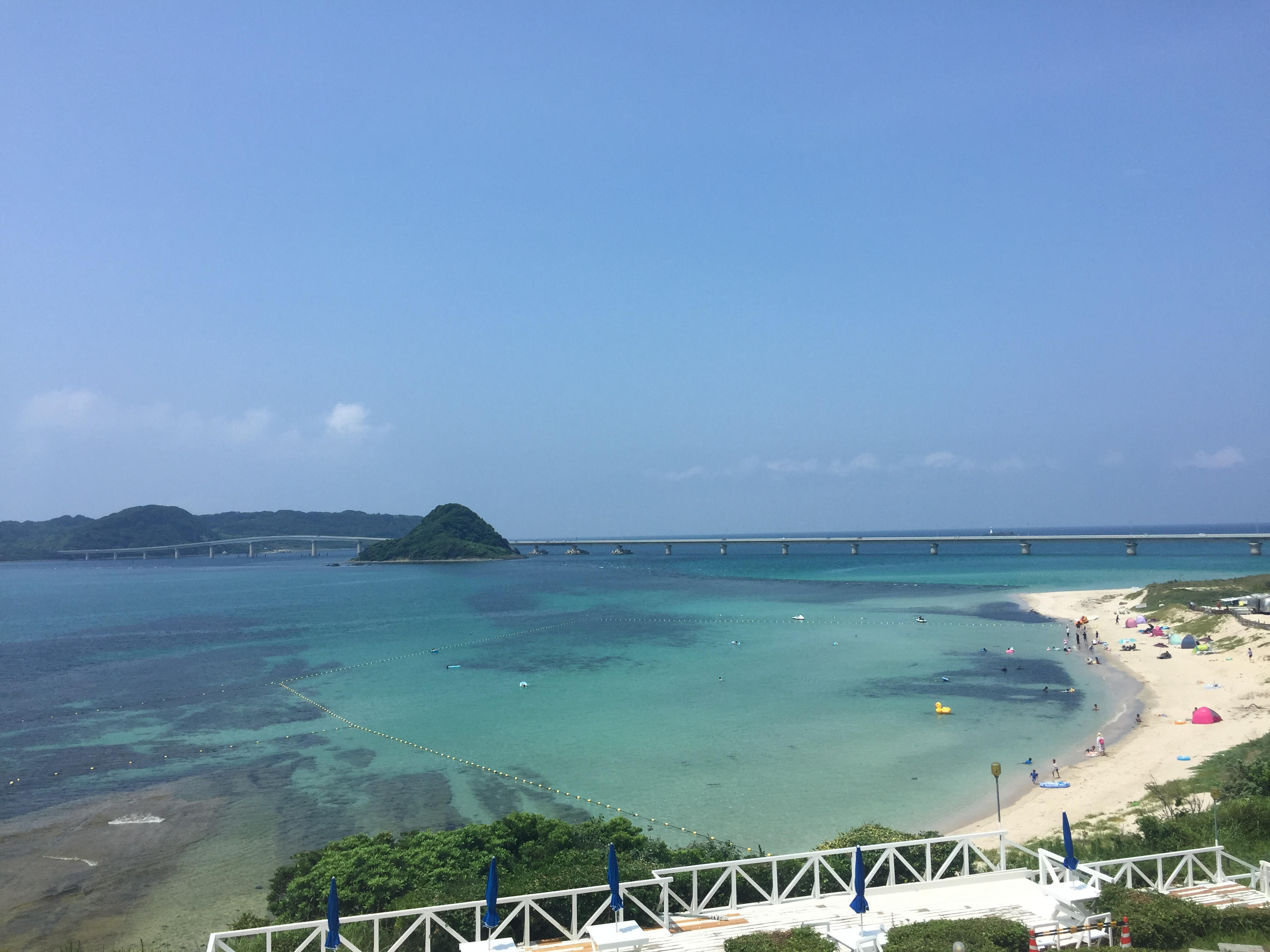 砂浜と角島大橋